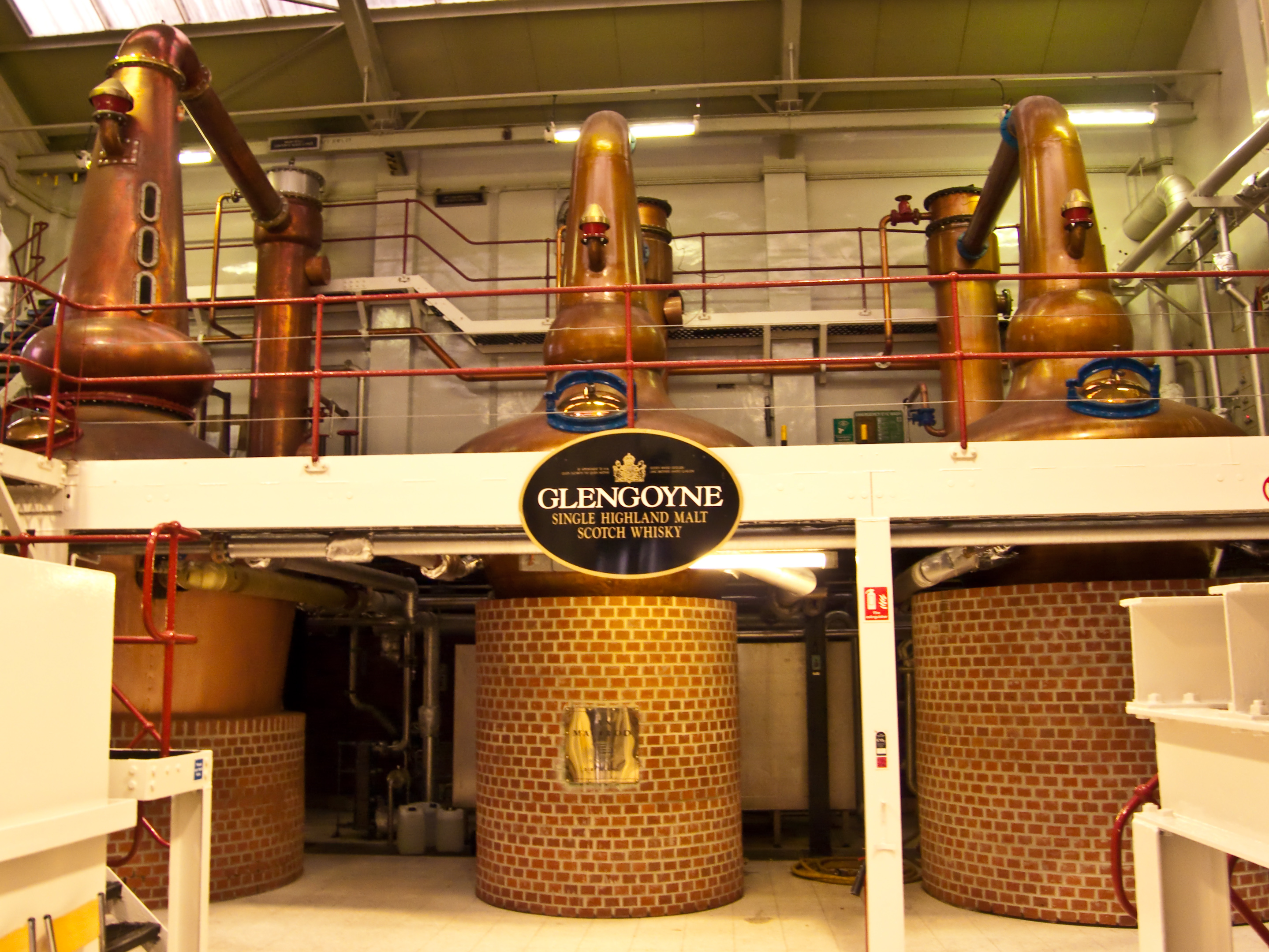 Glengoyne Distillery